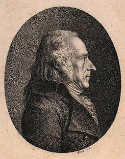 Gerhard Ludvig Lahde (1765-1833), kobberstikker født i Bremen